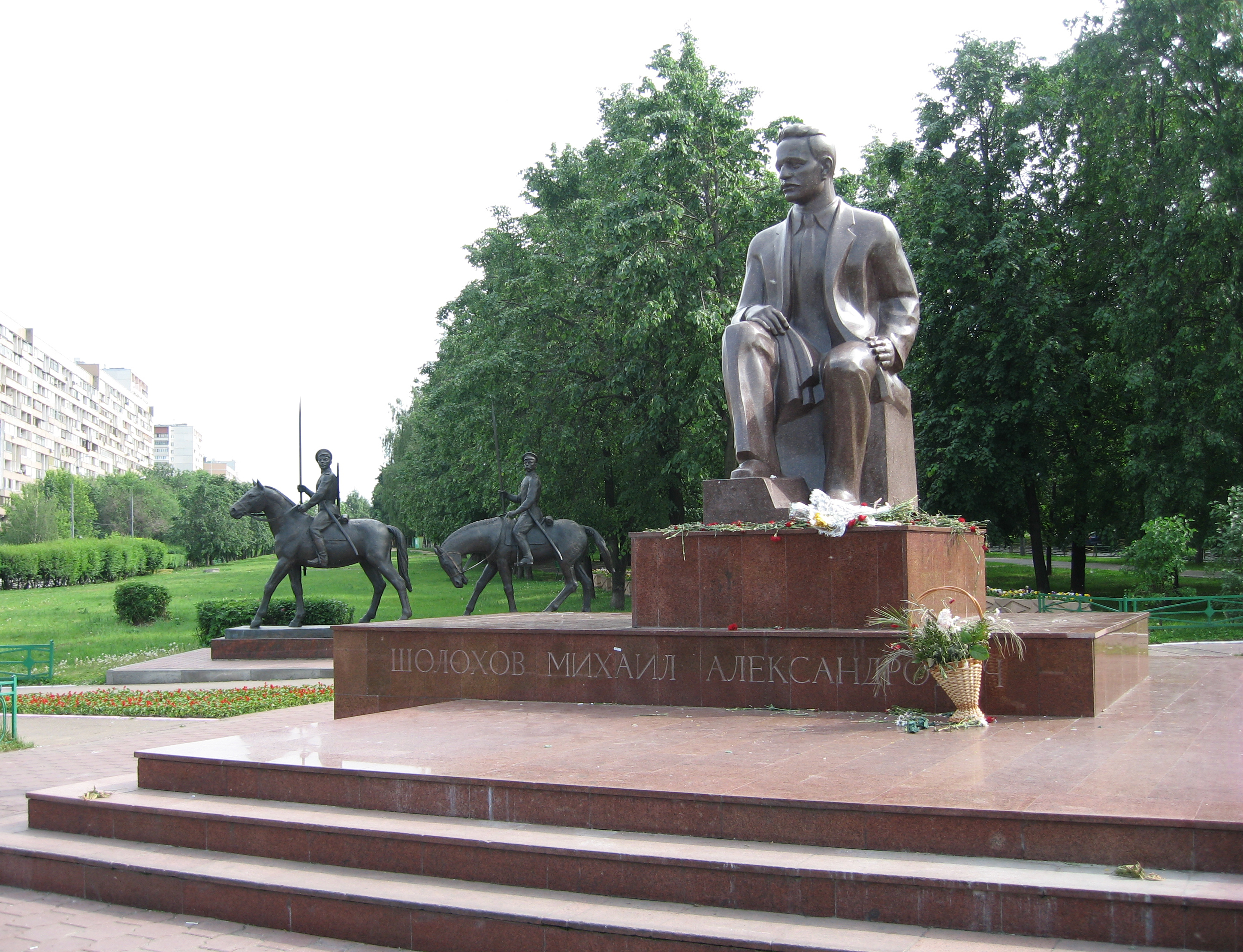 Памятник Шолохову на Волжском бульваре в Москве (скульпторы В.В.Глебов-Вадбольский, Ю.В.Дрёмин, 2002-2006)